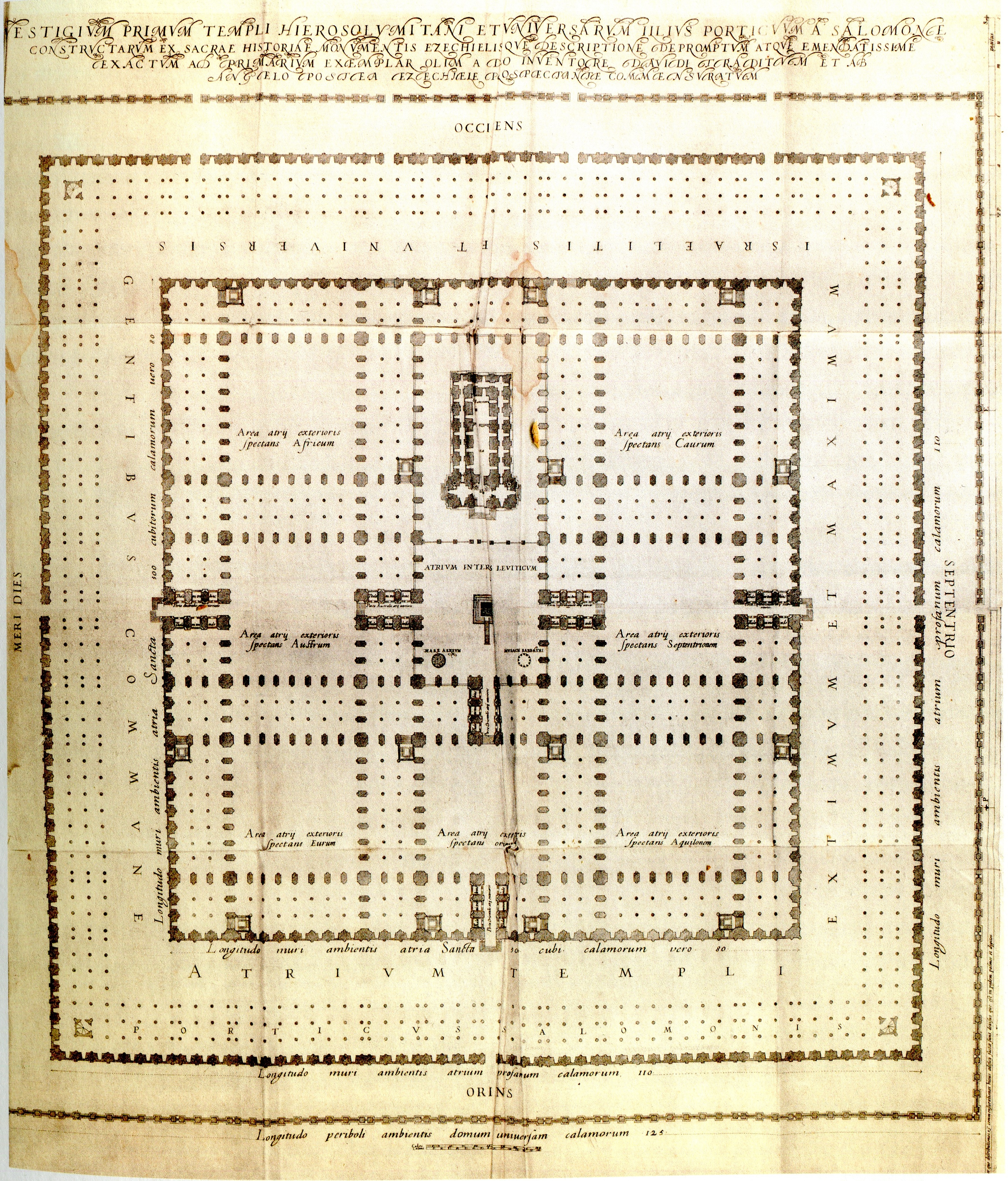 Grundriss des Jerusalemer Tempels in der Rekonstruktion von Juan Bautista Villalpando